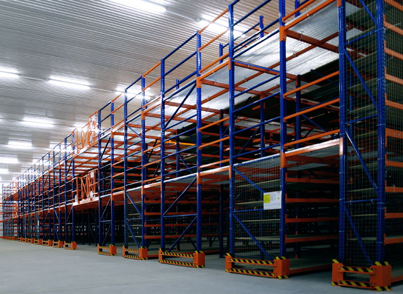 Фото мезонина